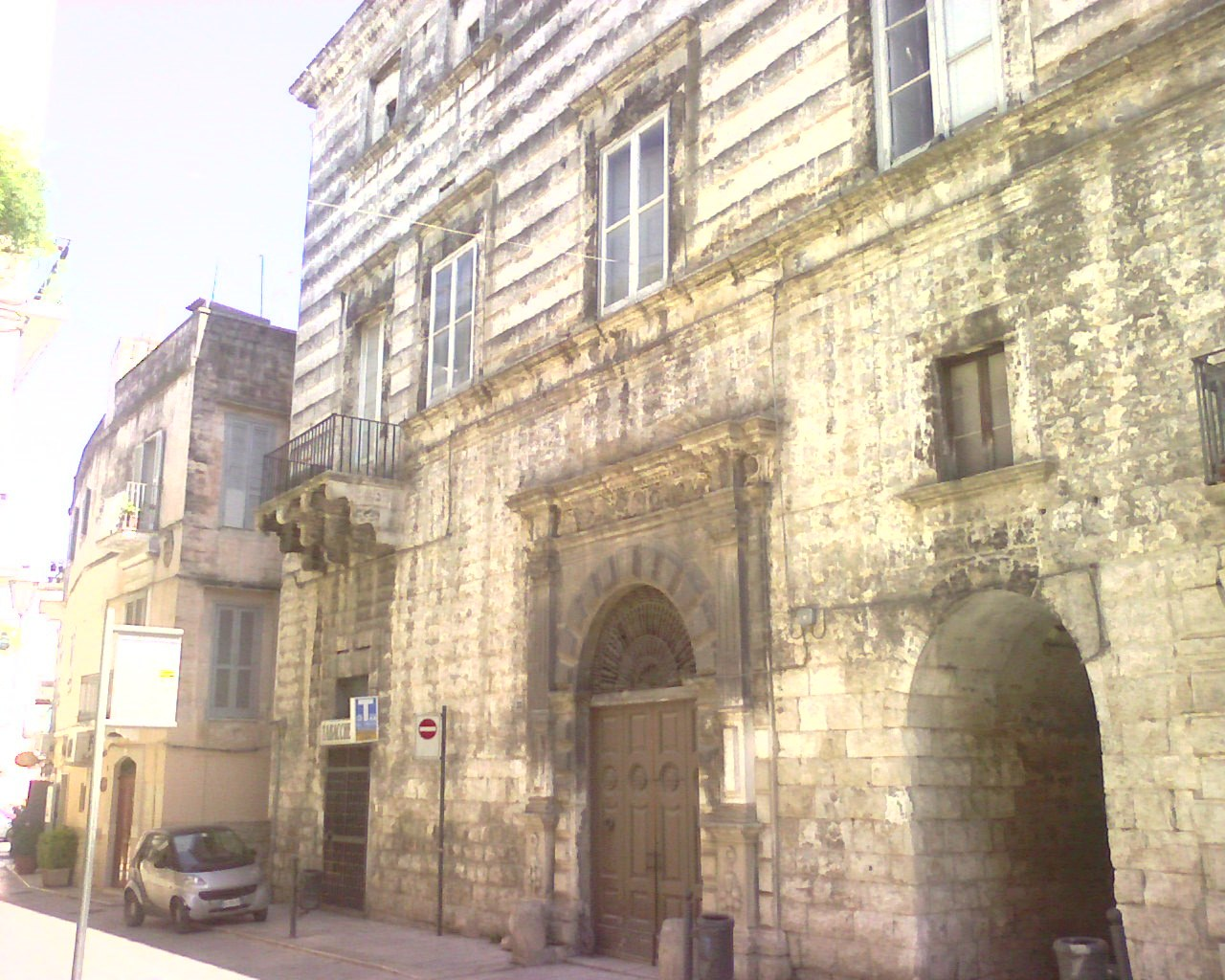 palazzo pascale-scarli - Modugno (bari)-Italy